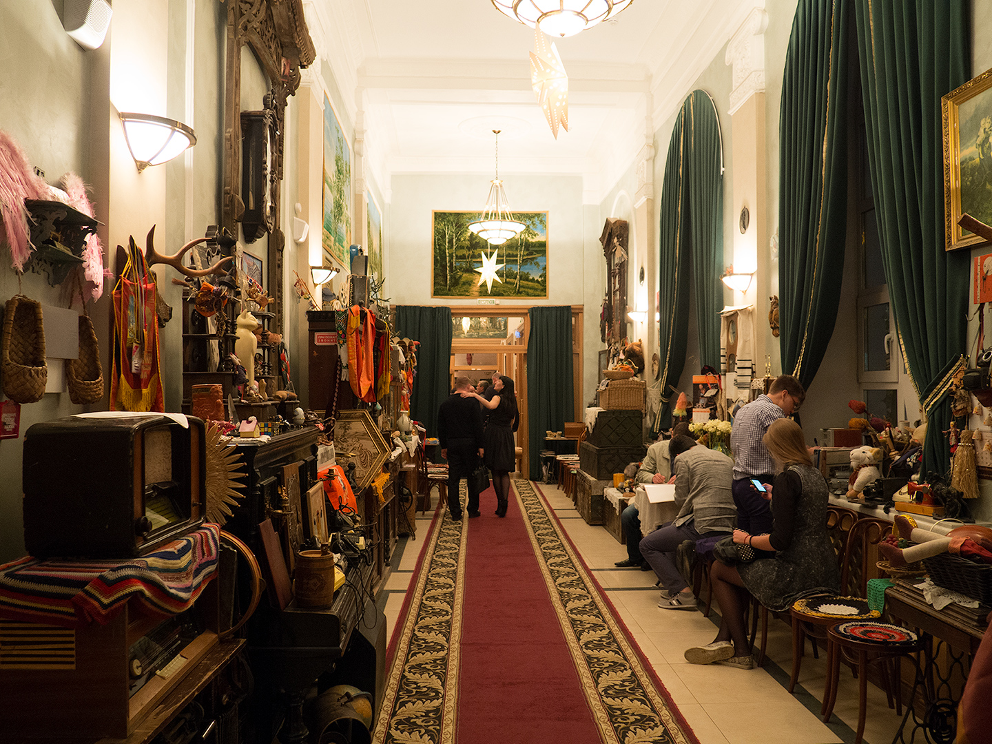 Екатеринбург: пр.Ленина,97/10: Коляда-театр; 19.05.2015